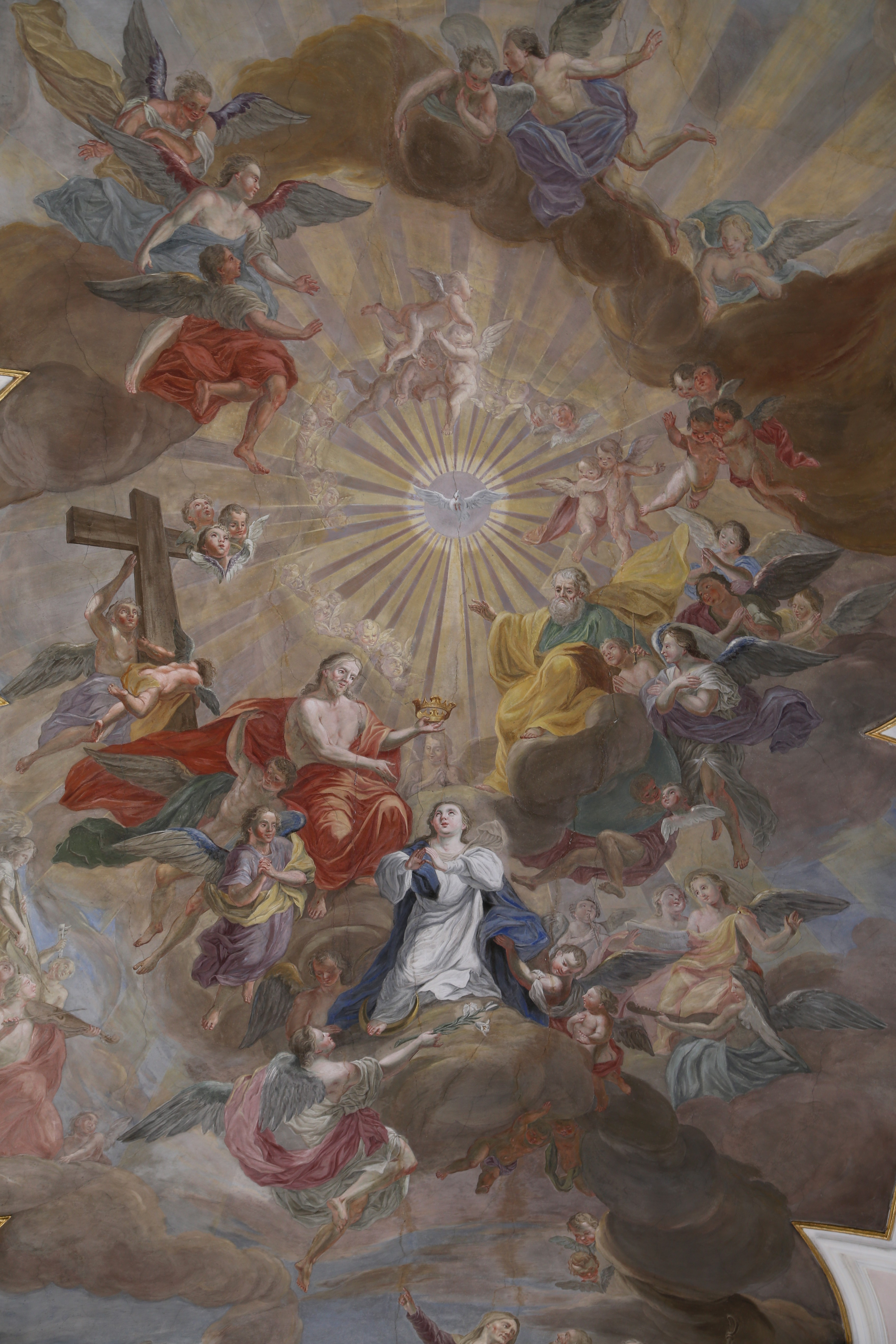 Kath. Pfarrkirche Mariä Himmelfahrt (lt. BDA Unsere Liebe Frau), Kirchbichl; Deckengemälde